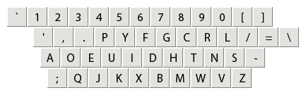 Dvorak keyboard layout